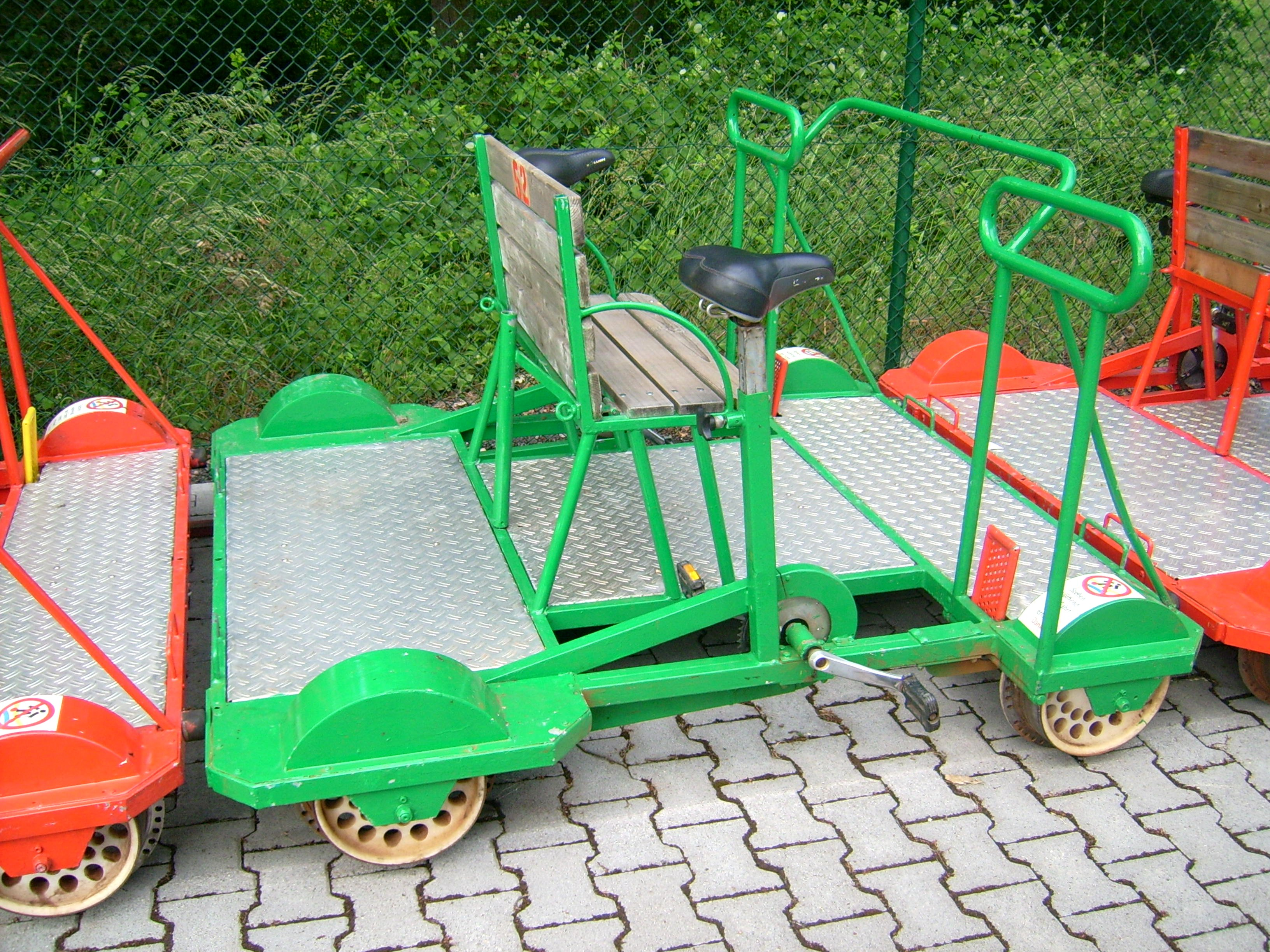 Draisine der Strecke Altenglan Staudernheim